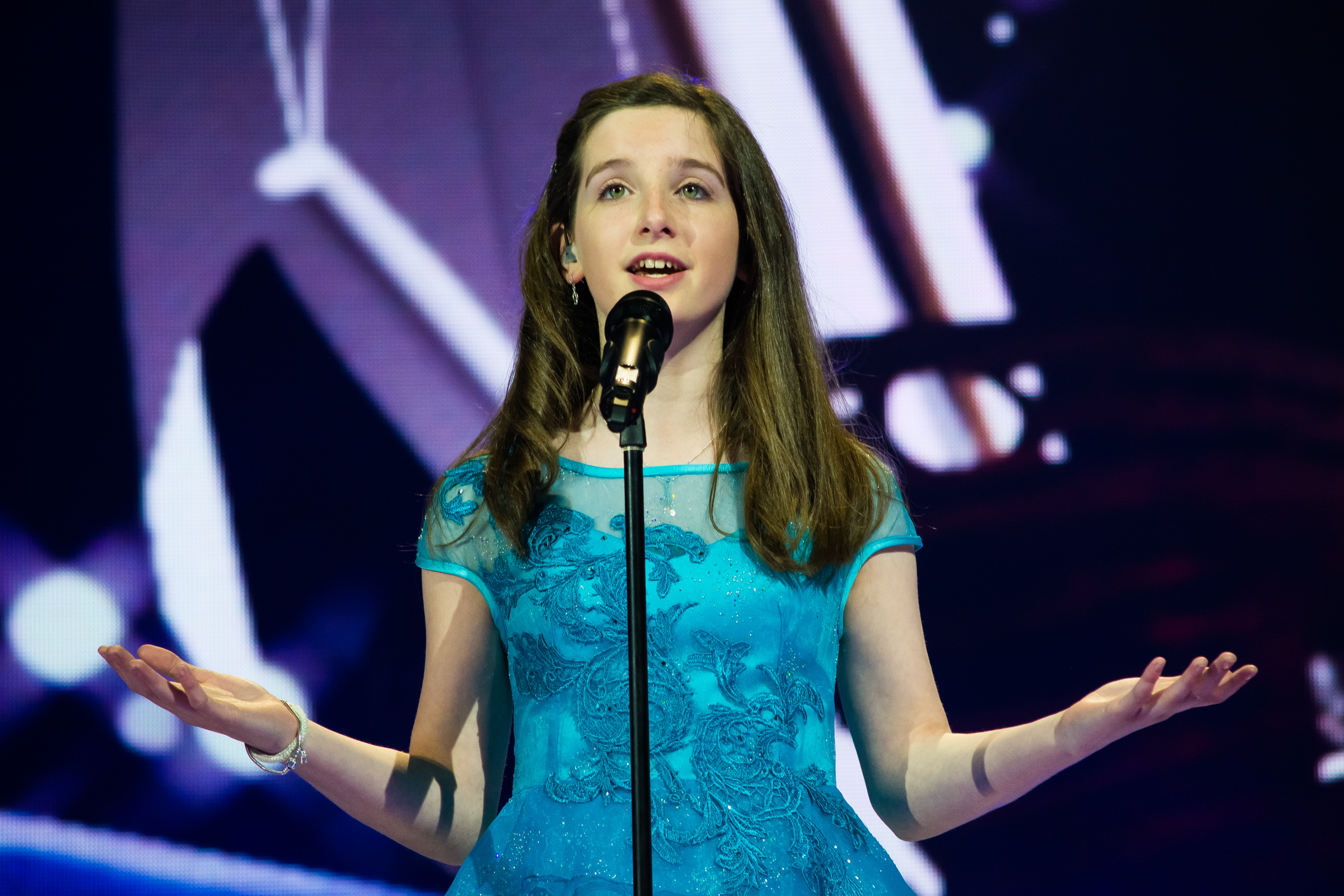 Эйми Бэнкс на сцене Детского Евровидения 2015 («Армеец», София) во время генеральной репетиции